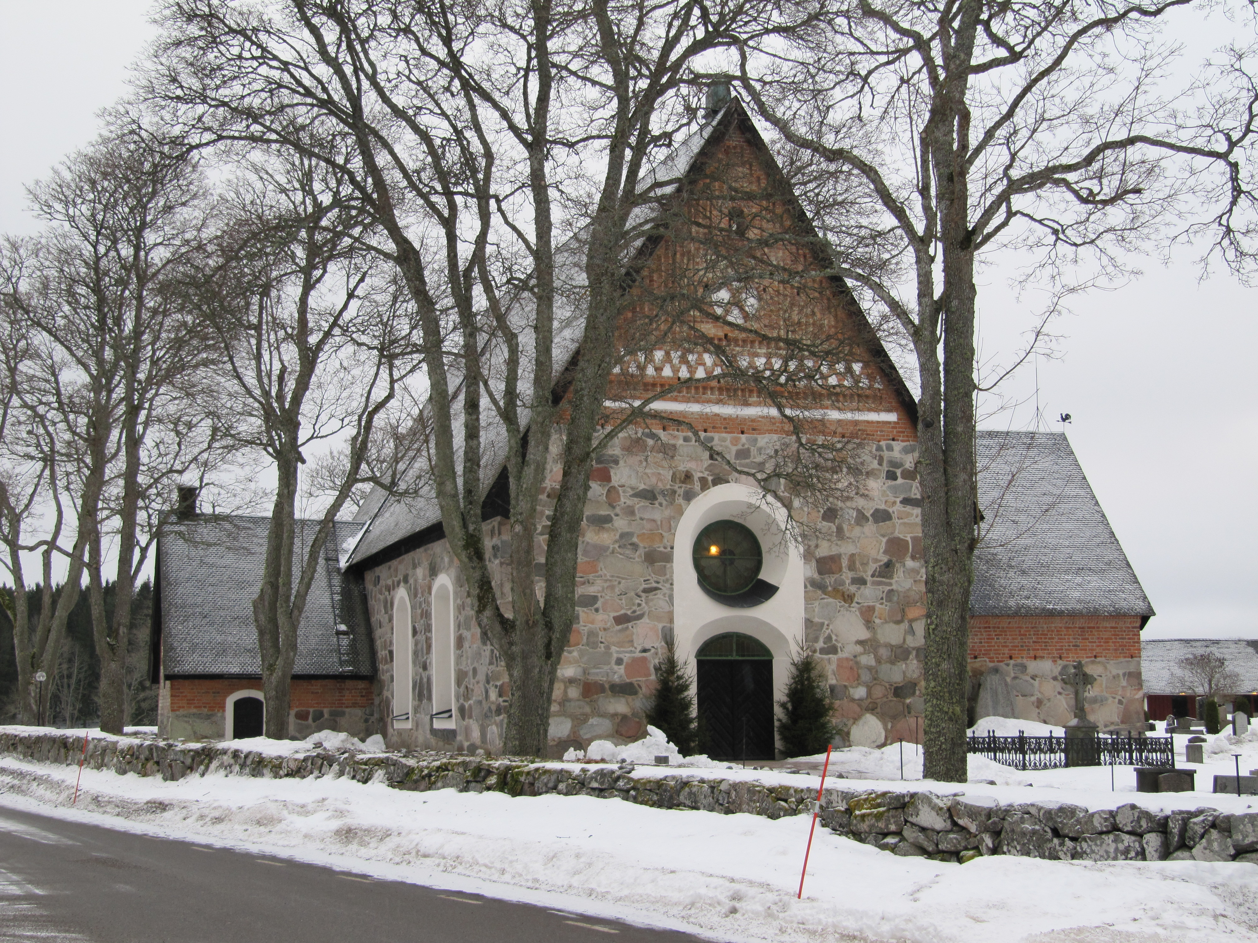 Rimbo kyrka